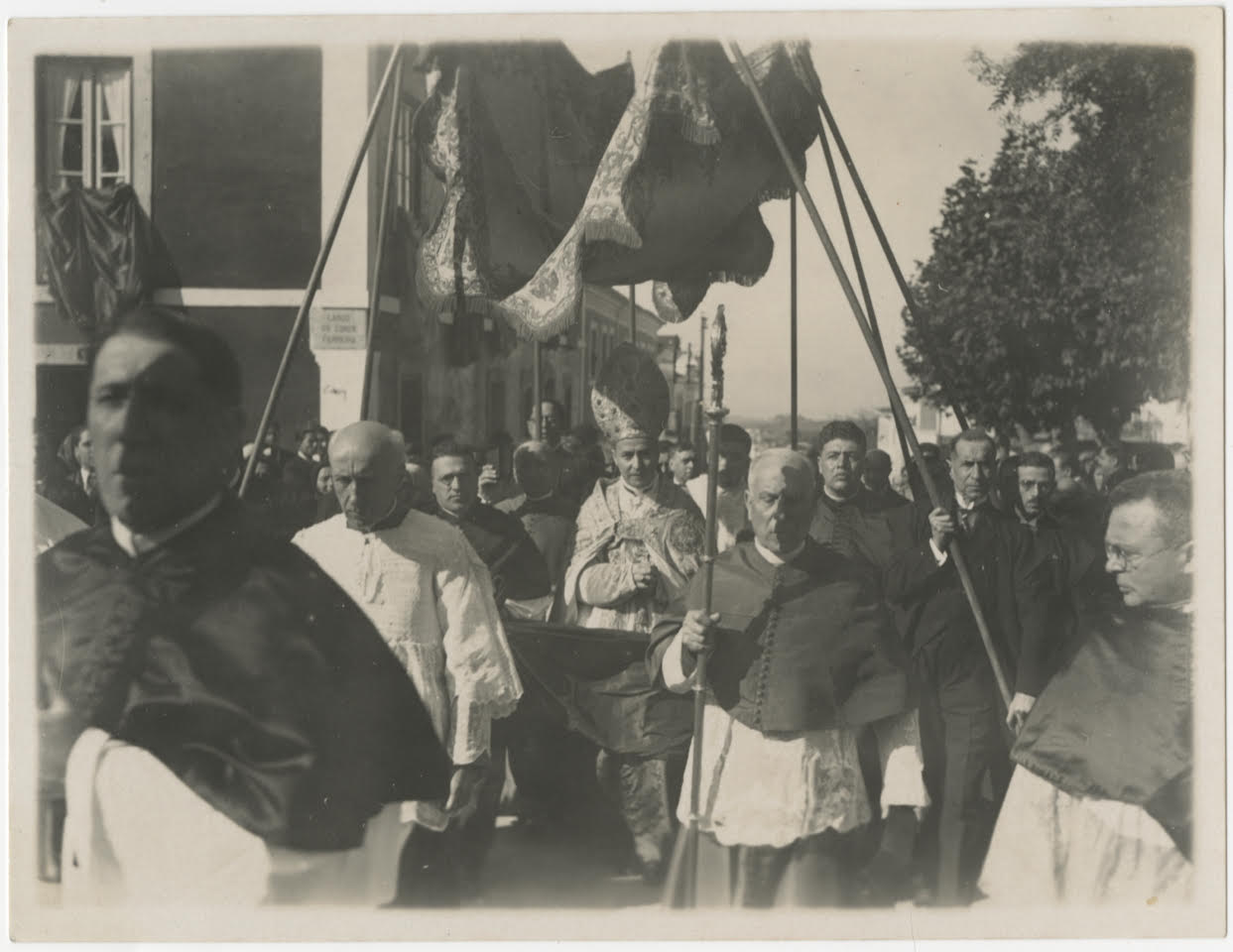 Procissão com Cardeal Patriarca de Lisboa, em Mafra